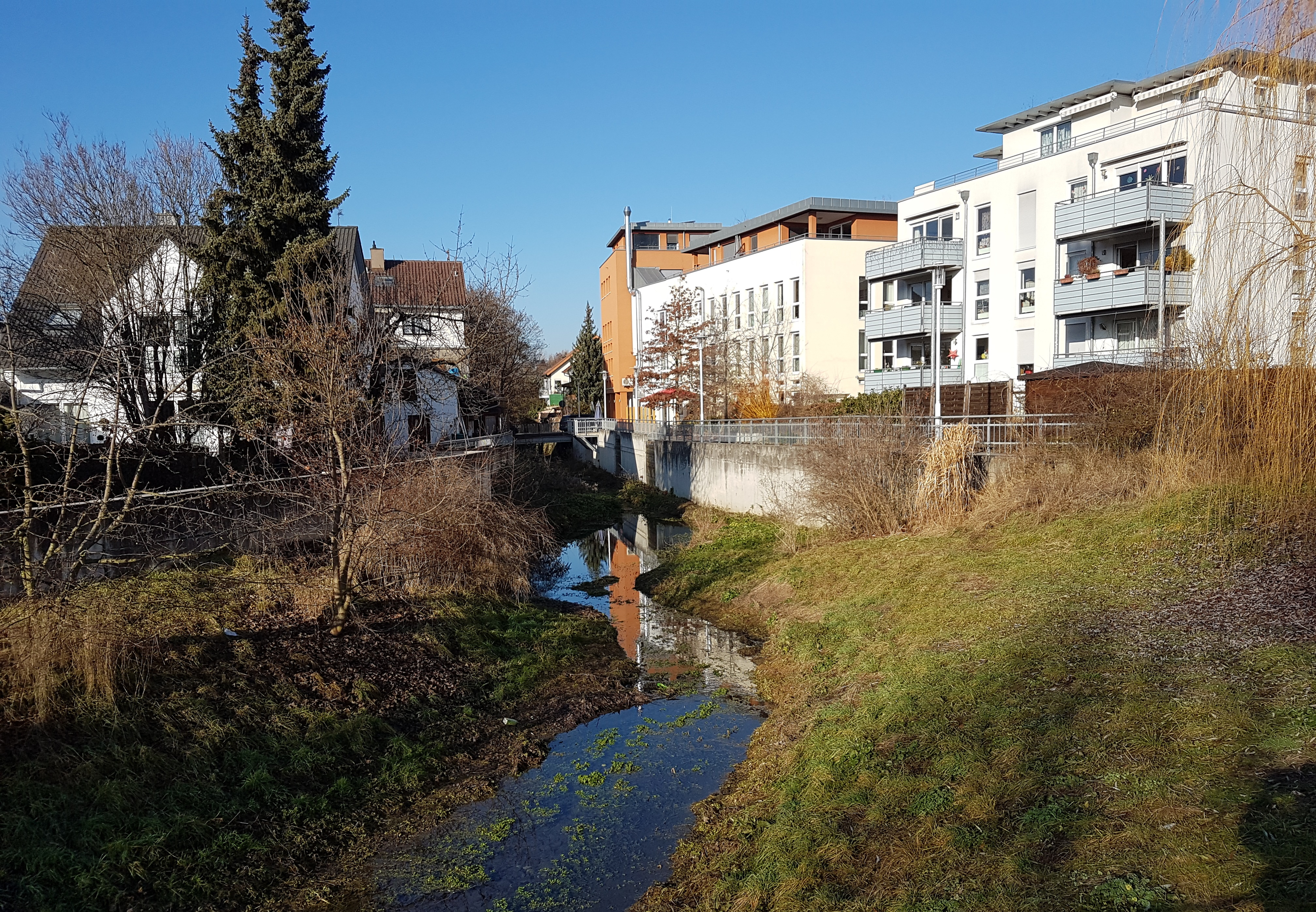 Renaturierter Abschnitt des Lindenbachs kurz nach der Einmündung des Beutenbachs im Stadtgebiet von Ditzingen